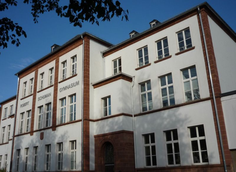 Das Robert-Schuman-Gymnasium in Saarlouis